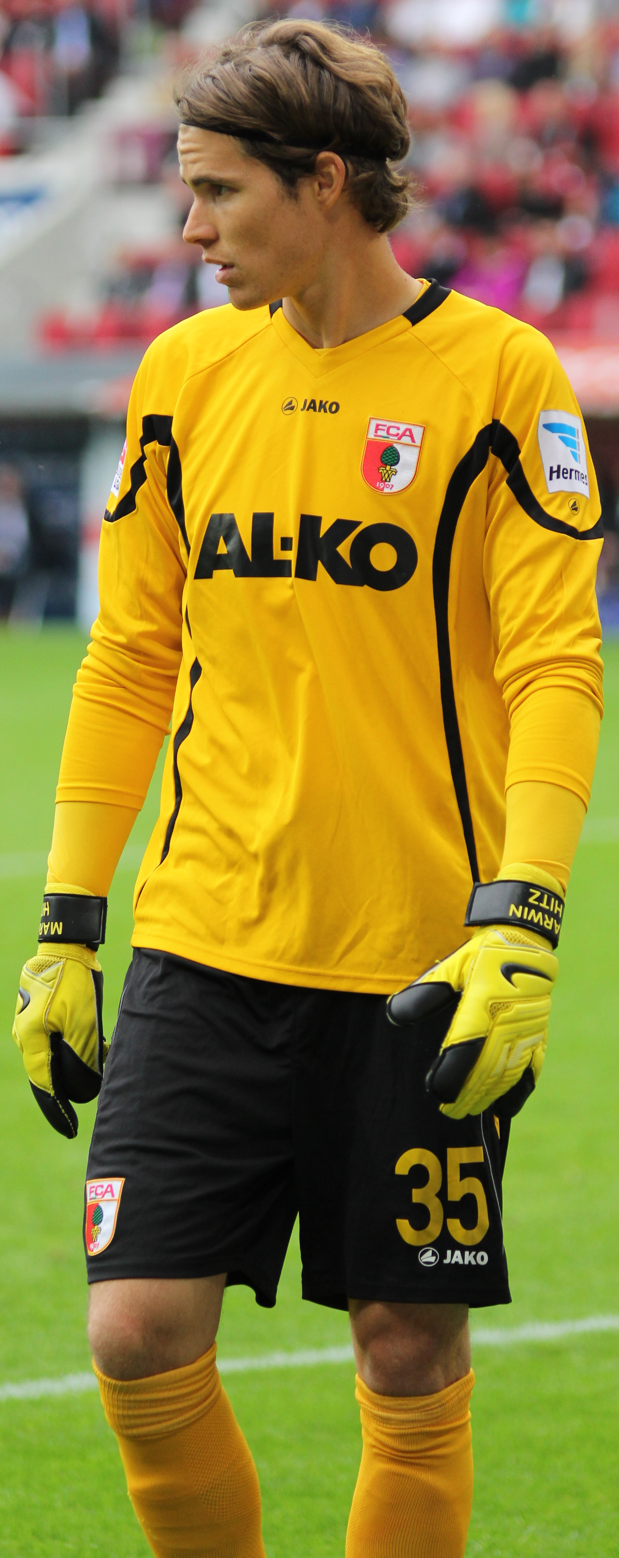 Marvin Hitz beim Spiel zwischen dem FC Augsburg und dem VfB Stuttgart am 25.08.2013